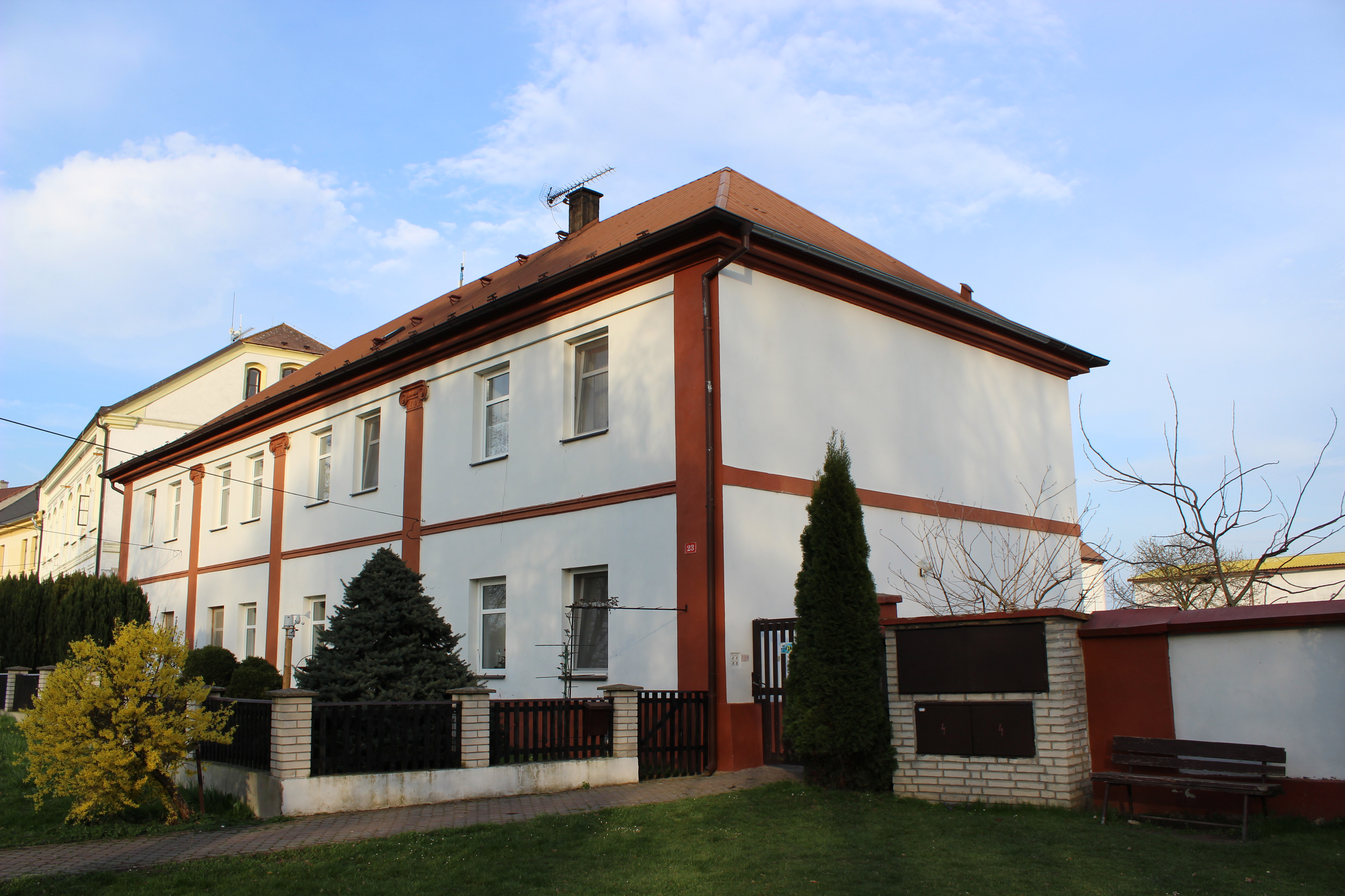 Dům číslo popisné 23 v Kadlíně. This photograph was taken with a Canon EOS 600D.